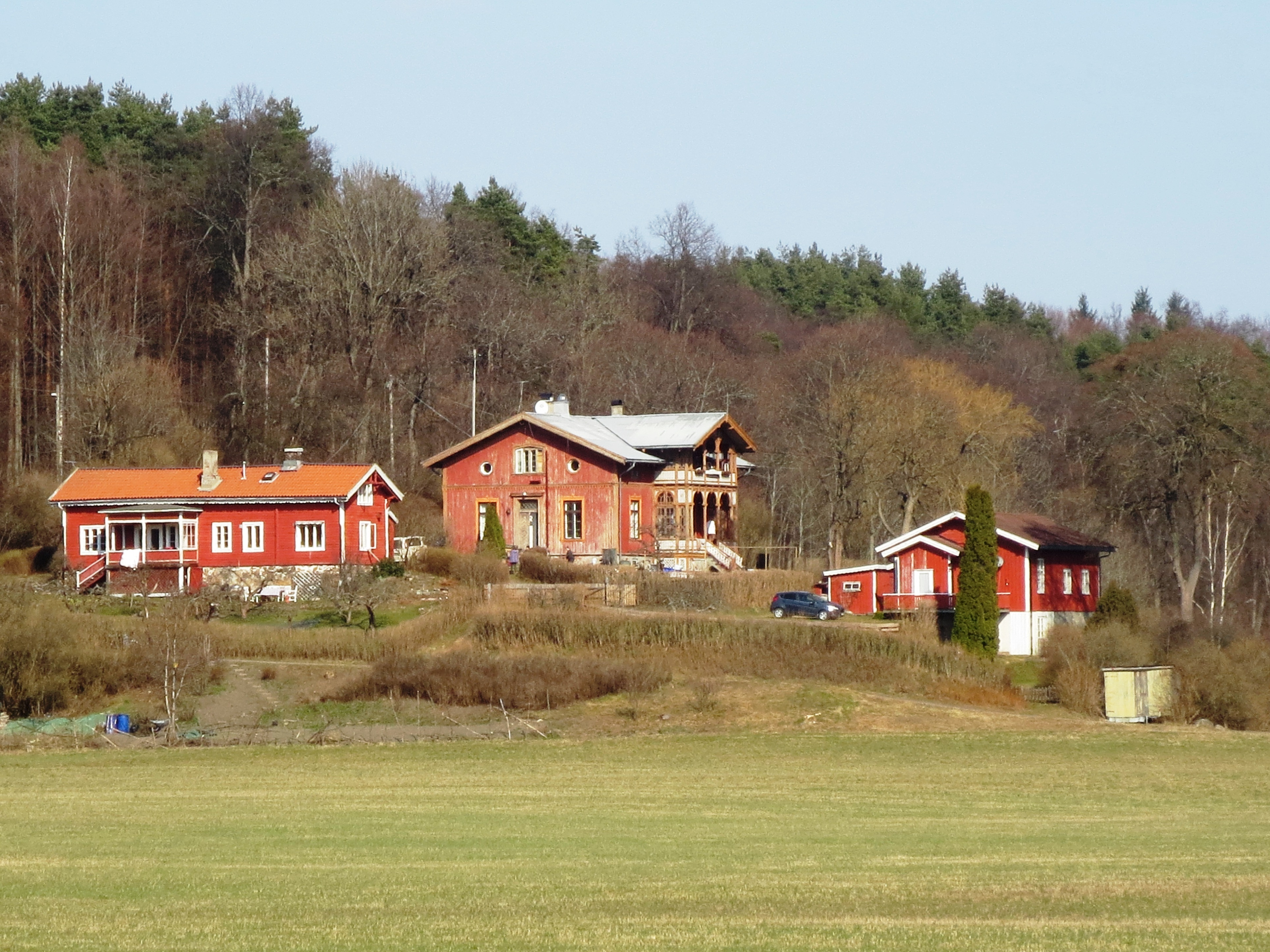 Hengsenga gård, en del av området Bygdøy kongsgård - Bygdøy i Oslo